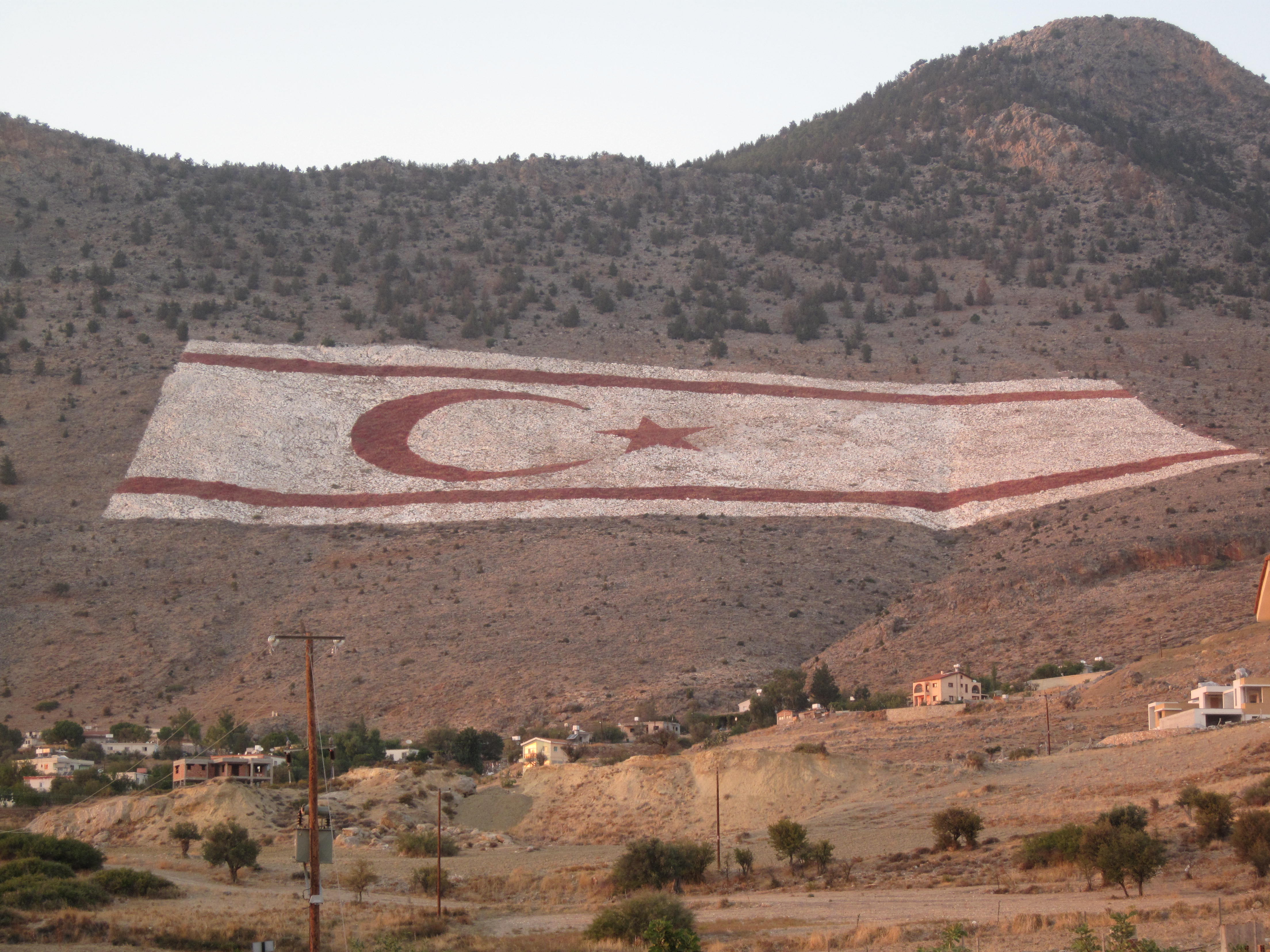 Cyprus noord met Turkse vlag op de berg